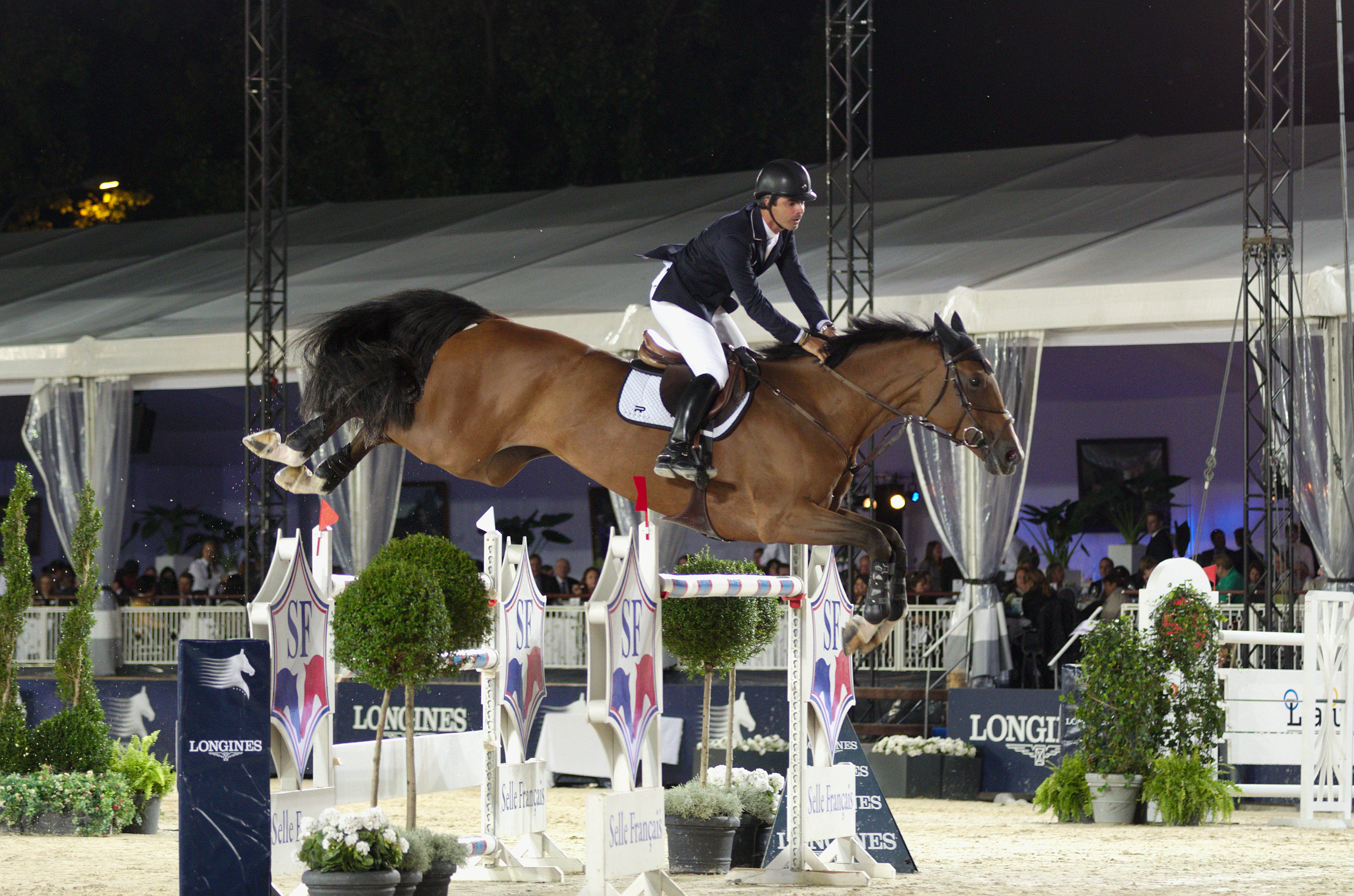 2013 Longines Global Champions - Lausanne - 13-09-2013: Rodrigo Pessoa / Cadjanine Z